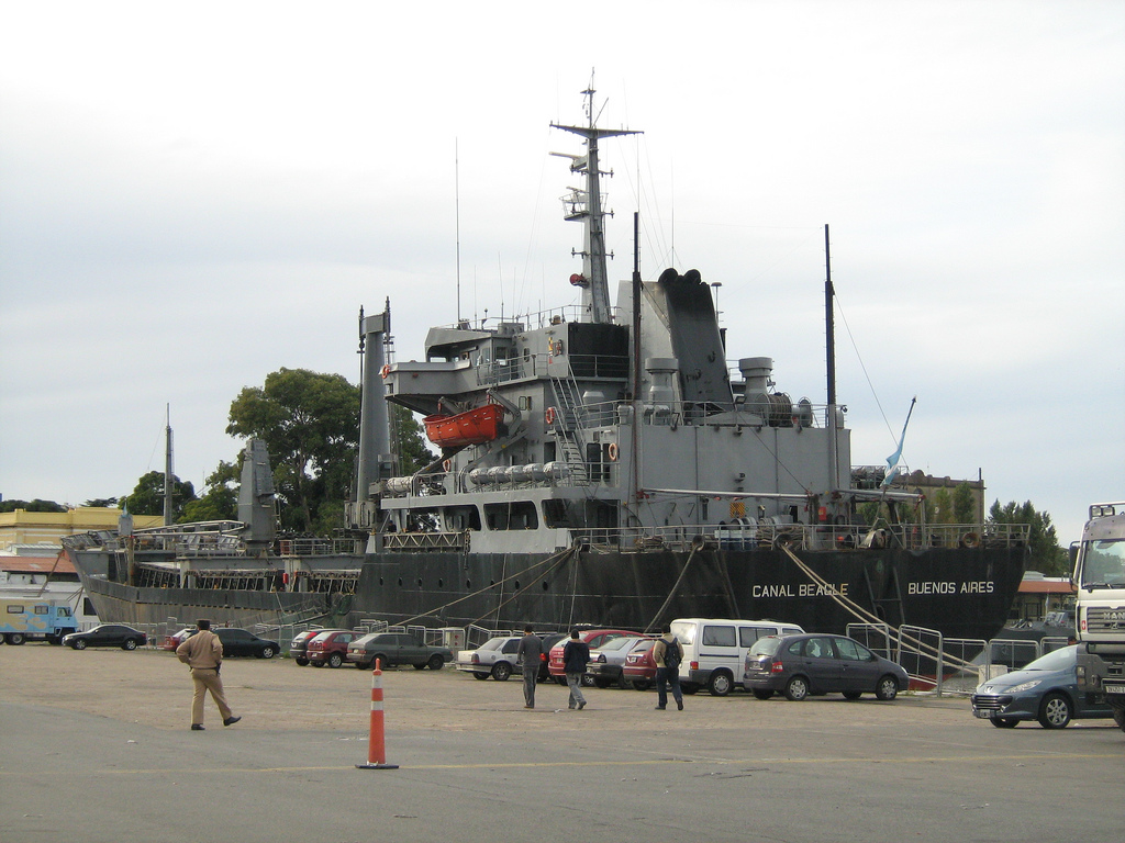 ARA Canal Beagle, Puerto de Buenos Aires, 2010.